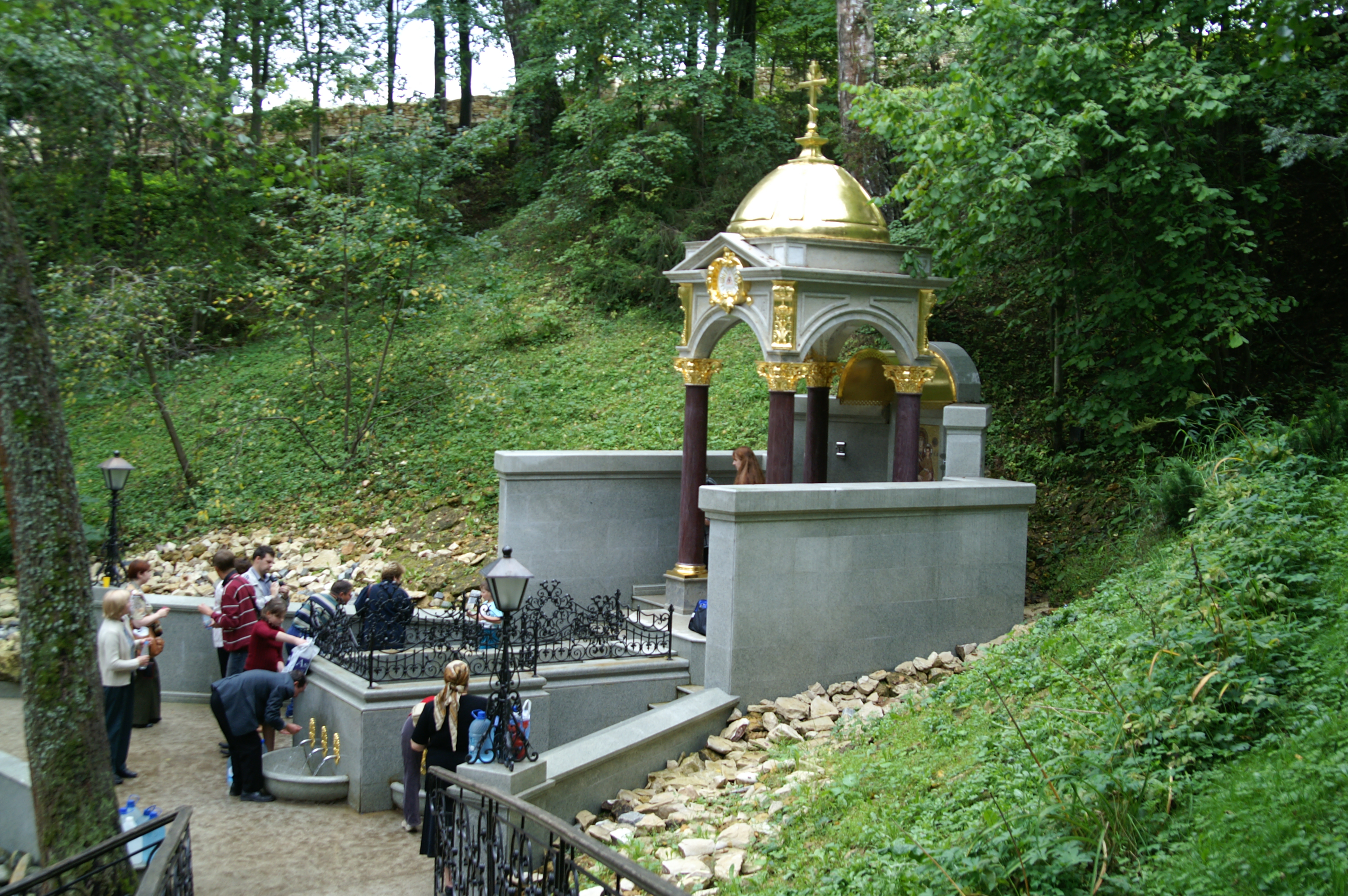 Источник преподобного Давида в селе Талеж Чеховского р-на Московской области - подворье Вознесенской Давидовой пустыни.